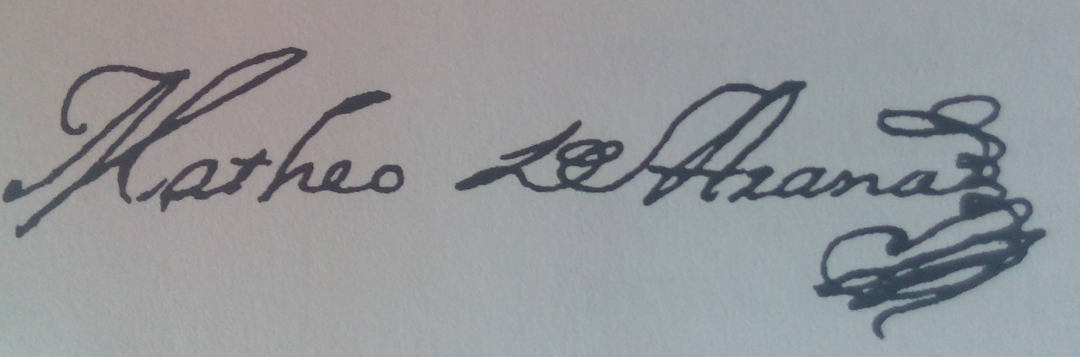 Firma del arquitecto Mateo de Arana